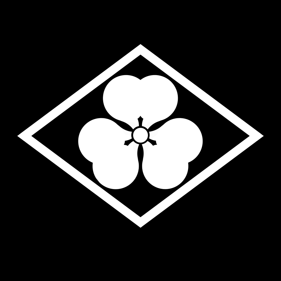 「菱に片喰」紋（染抜）